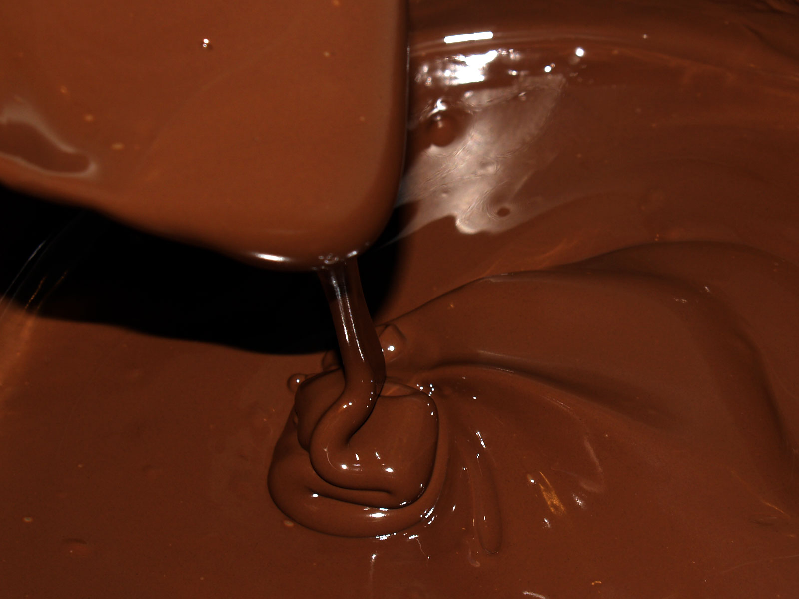 Chokolade